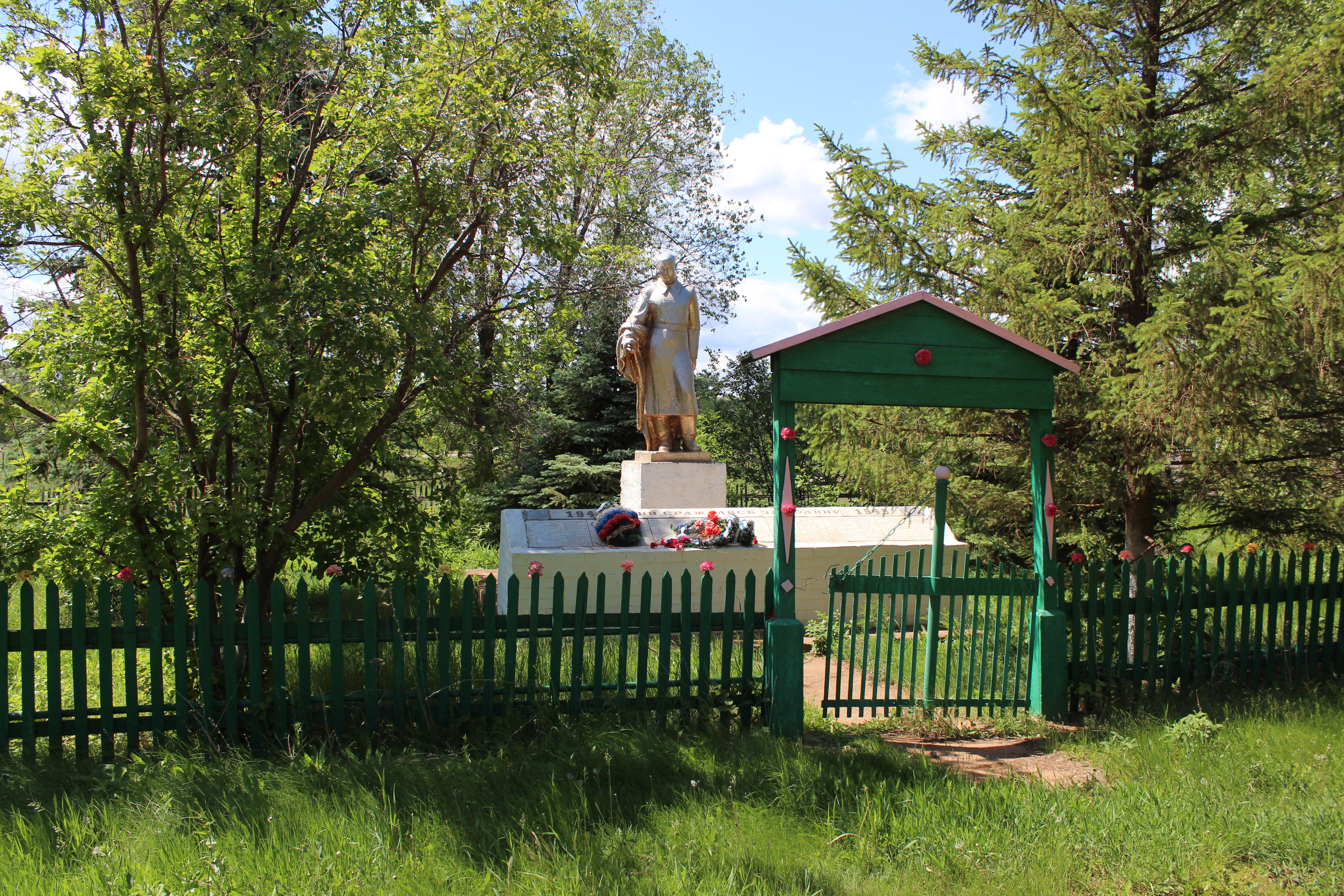 Башҡортса: Туҡ-Соран, Ҡотләмбәт ауылы Хәрби Дан мемориалы